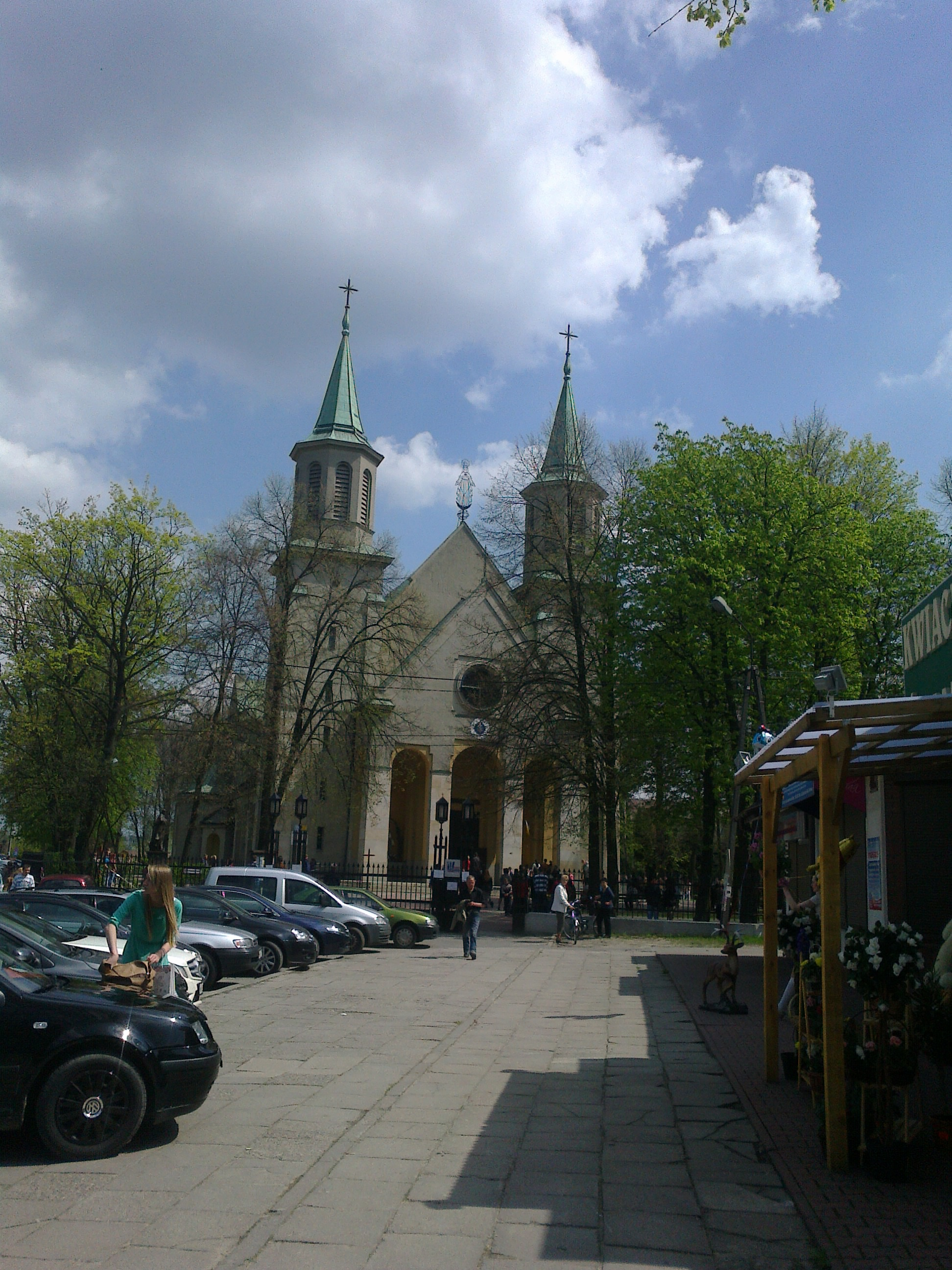 Kościół Matki Bożej Częstochowskiej w Wołominie